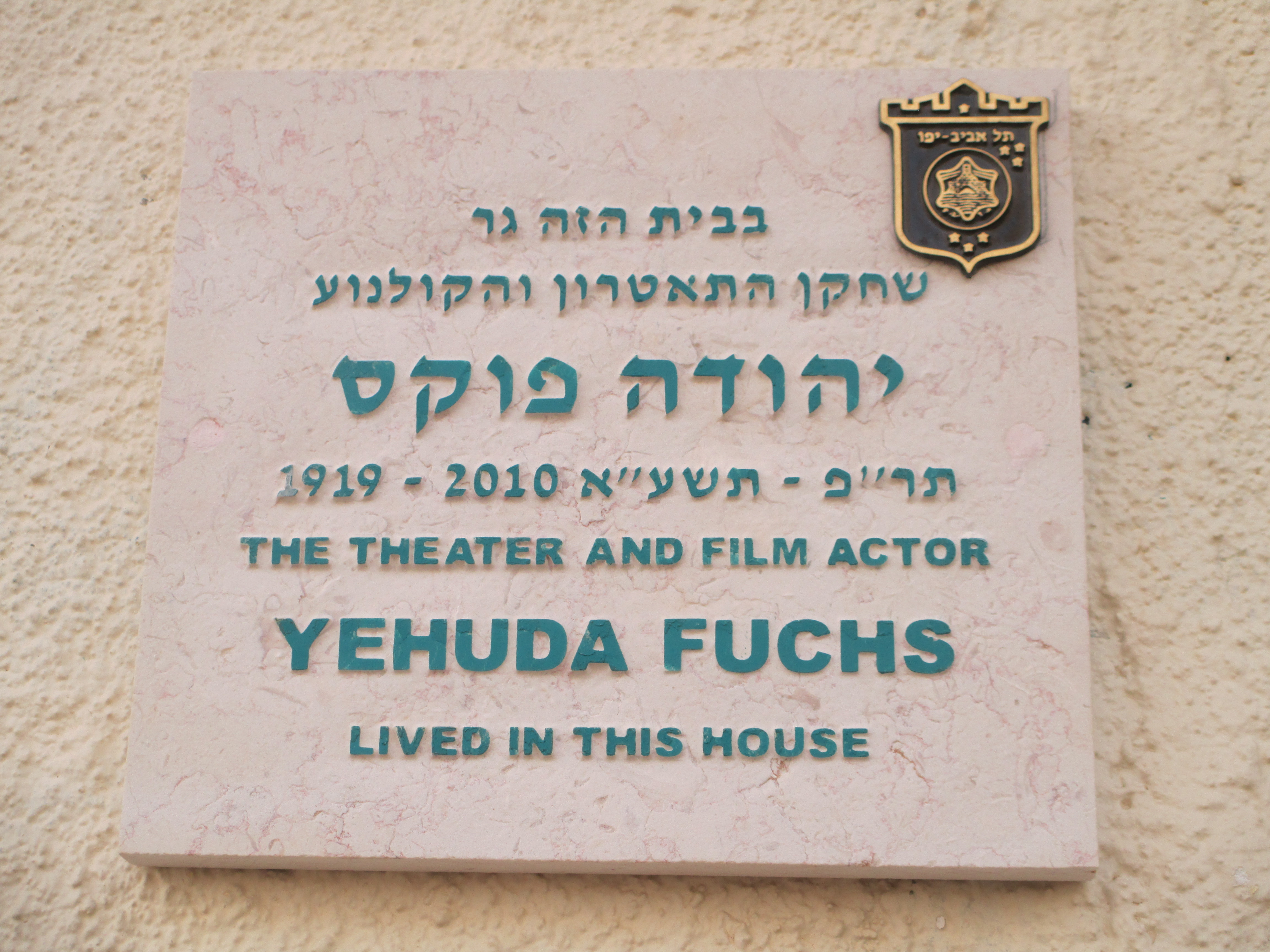 לוחית זיכרון לשחקן יהודה פוקס על ביתו ברח' בזל 44 בתל אביב